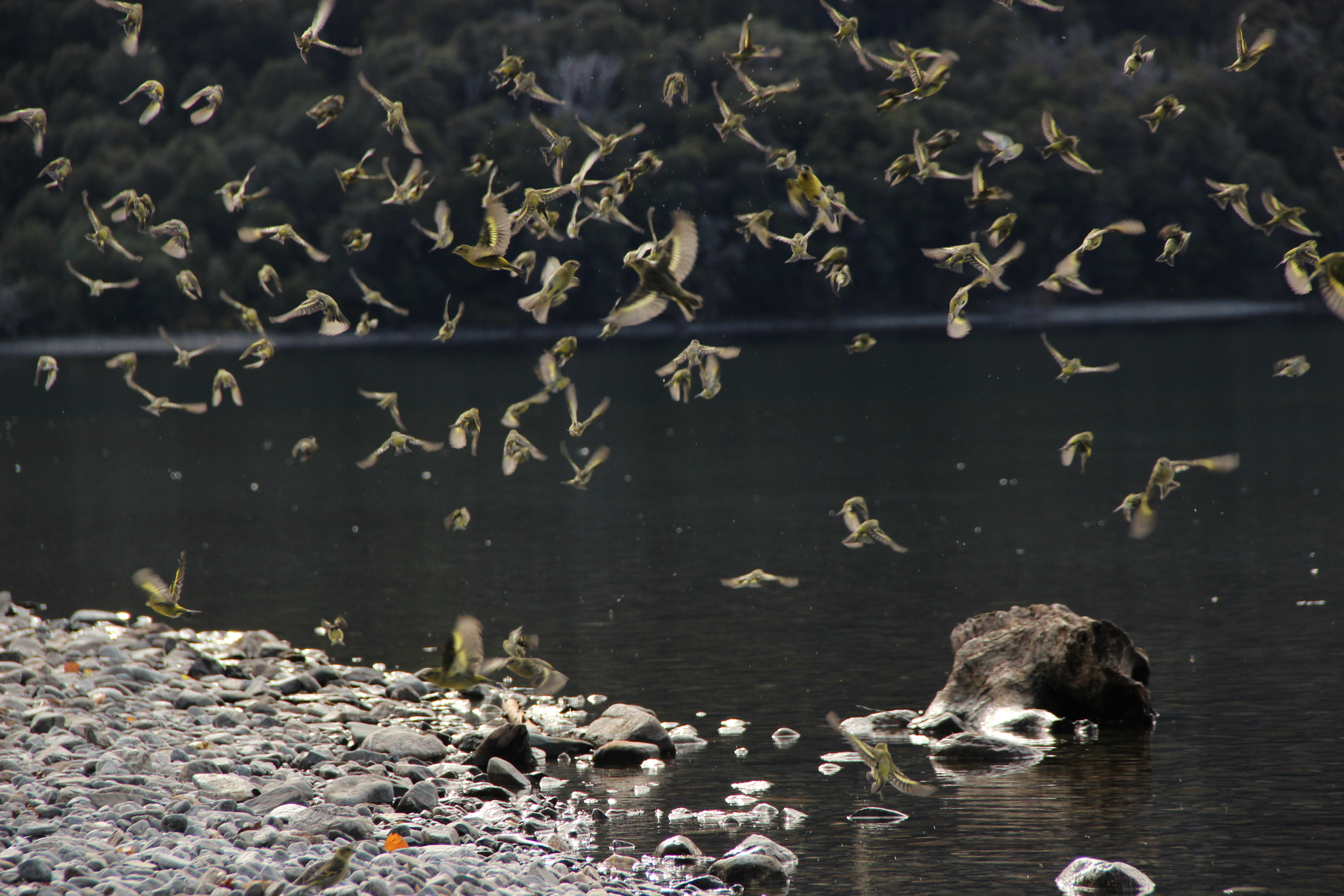 Lago Gutierrez, San Carlos de Bariloche